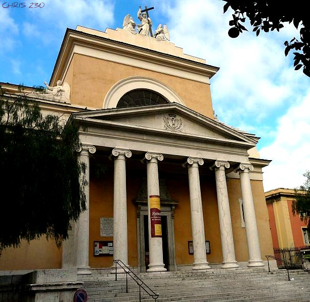 Église Notre-Dame des Grâces ou église Saint Jean-Baptiste dit du Voeu, à Nice (France).